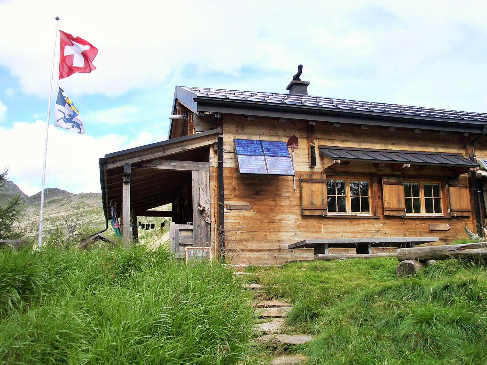 Buffalora hut GR, Switzerland self-made, August 2006